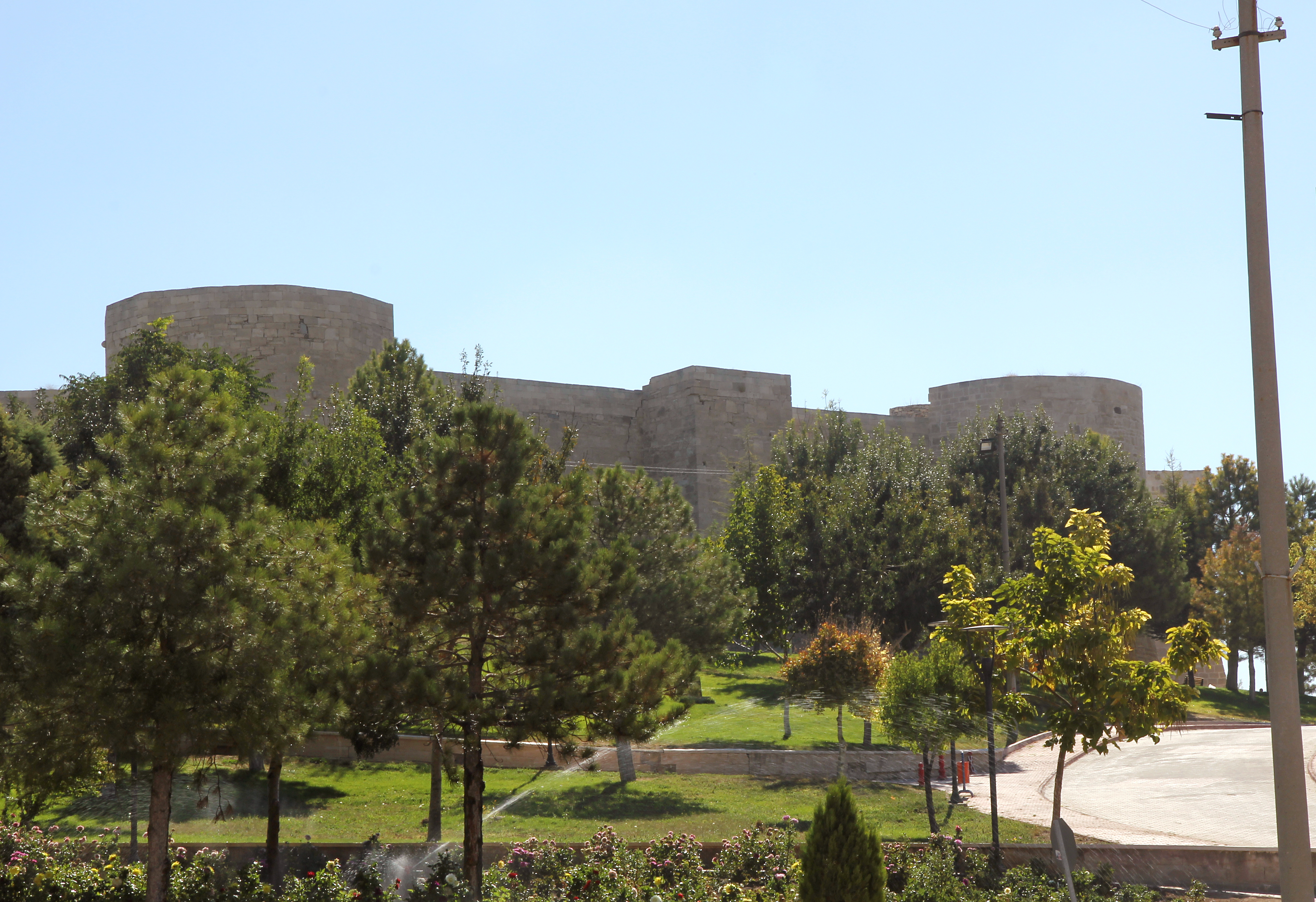 Zitadelle von Karaman, Südtürkei